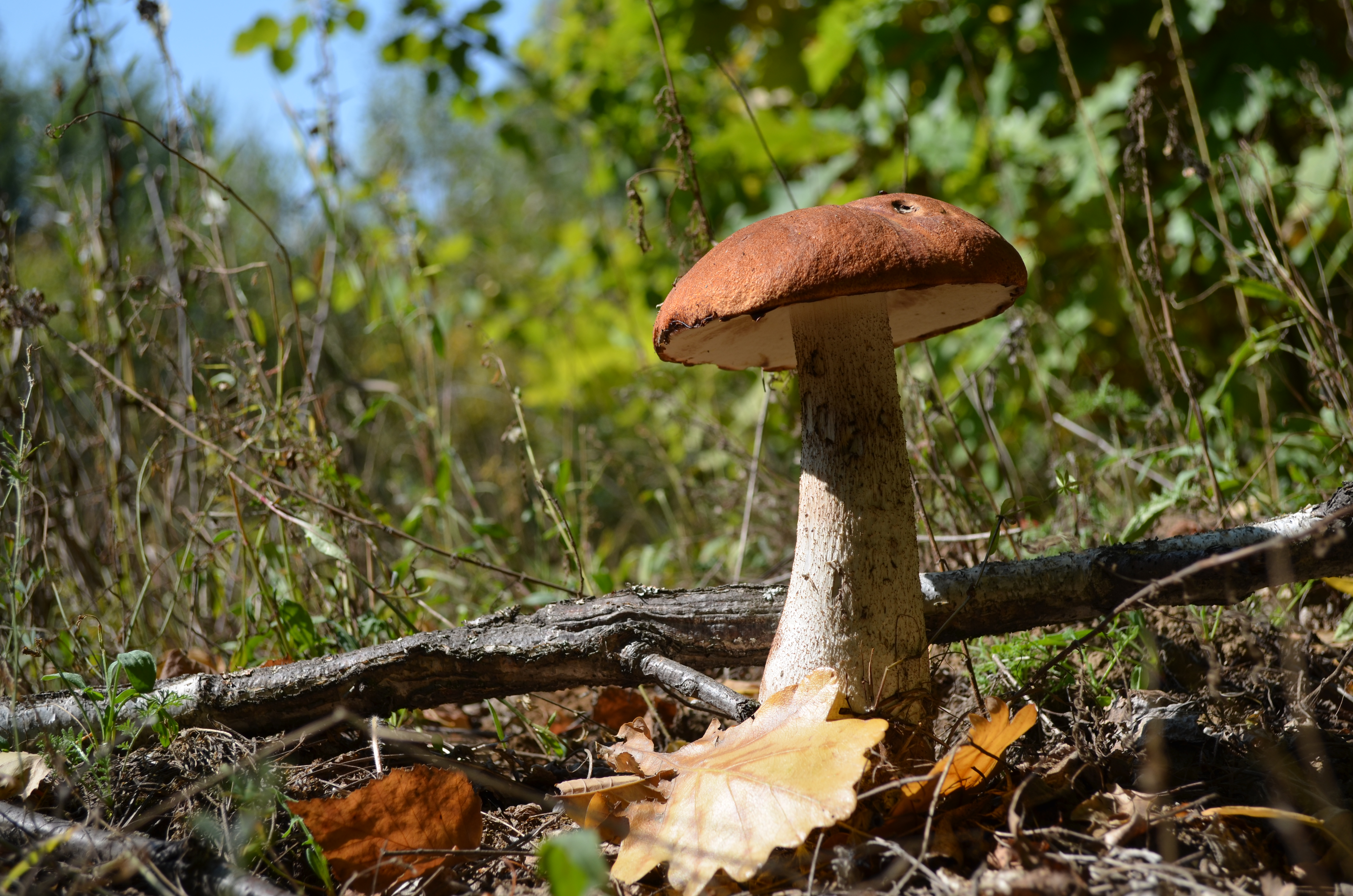 Рязань.Горроща.Подосиновик.